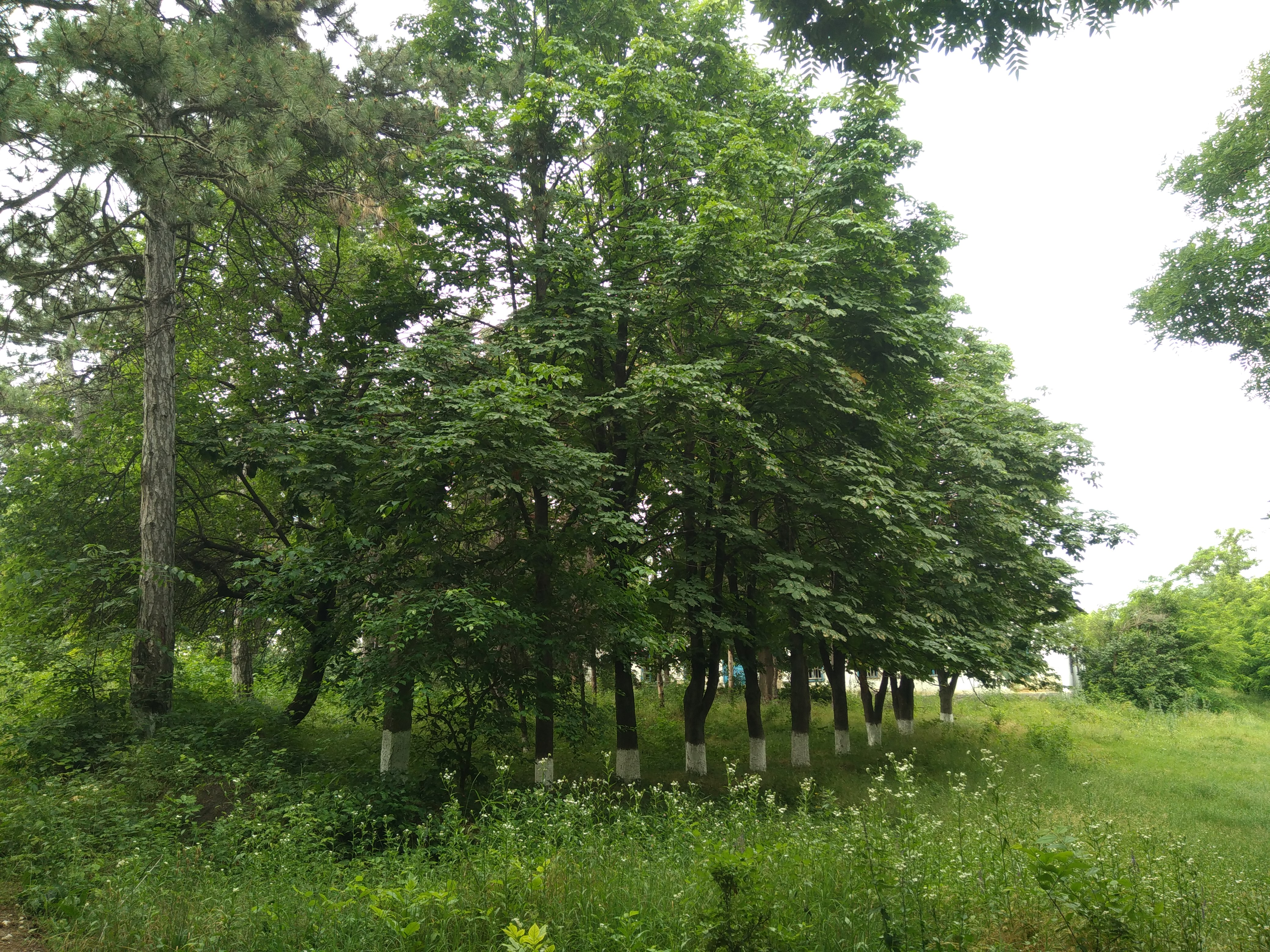 Parcul din satul Bălăbănești, monument al naturii amplasat în raionul Criuleni, satul Bălăbănești (cod MD-CR-map-007)